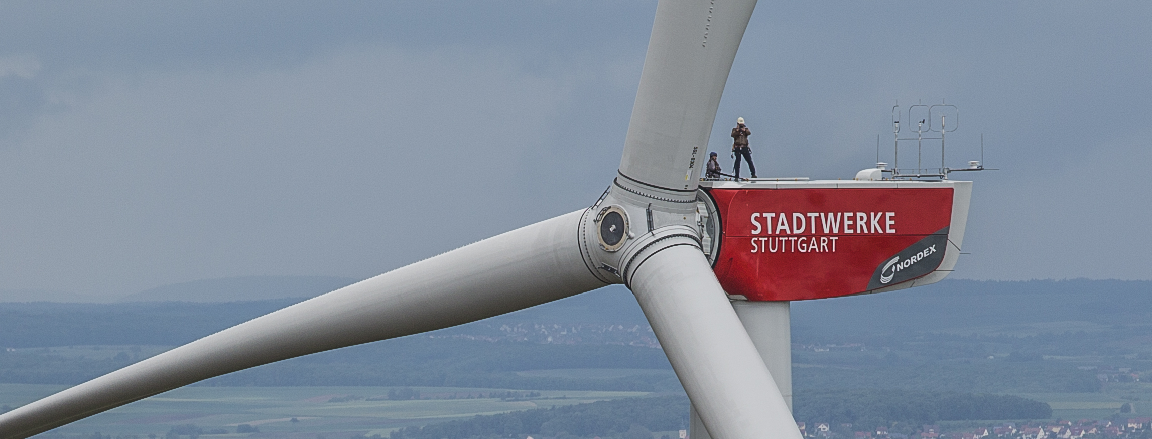 Windkrafträder der Stadtwerke Stuttgart in der Gemeinde Schwanfeld (Landkreis Schweinfurt).